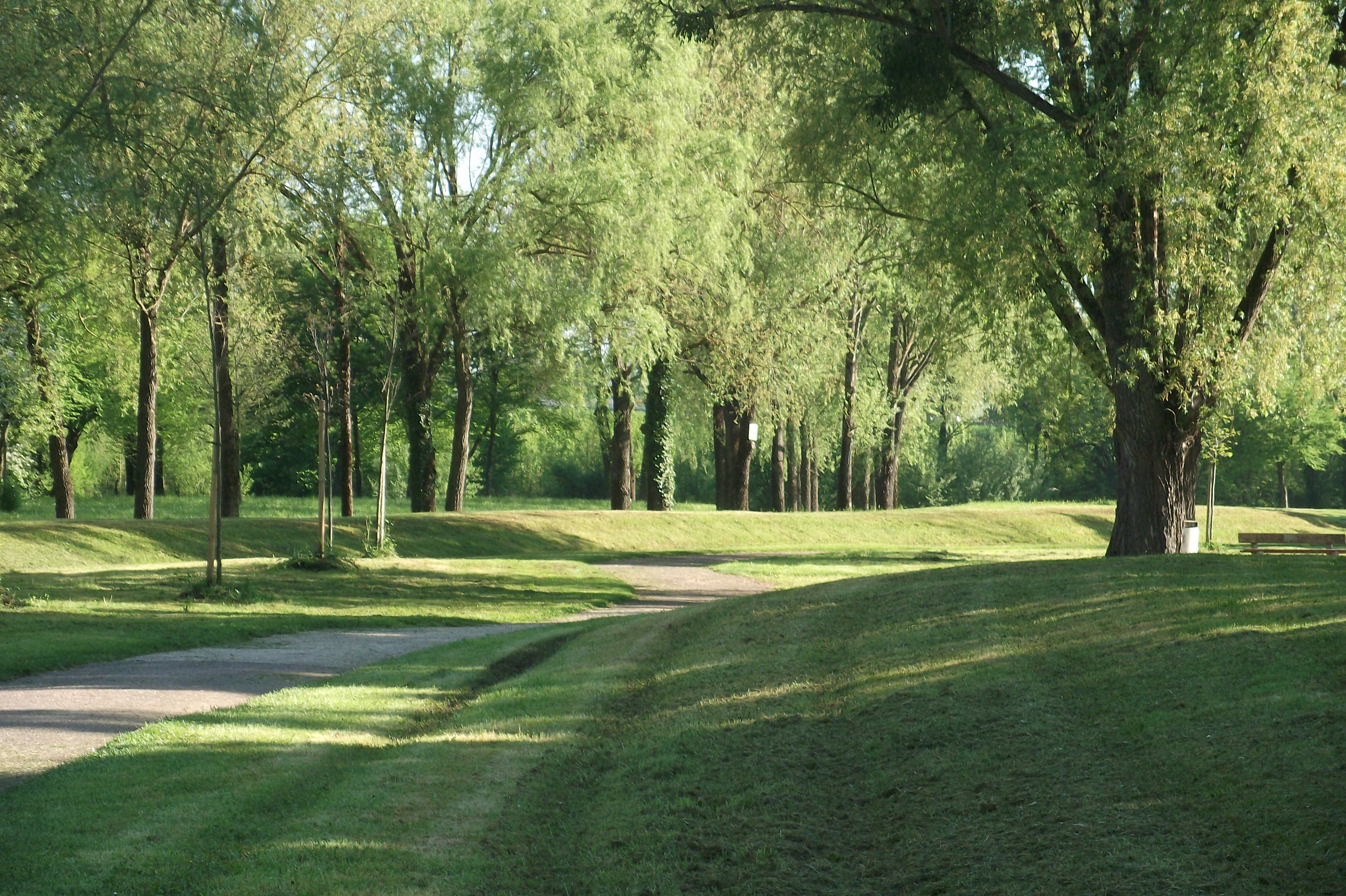 La coulée verte de Vesoul (Haute-Saône, Franche-Comté)